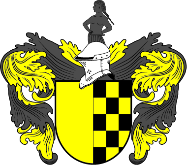 Wappen Hamza von Zabiedowitz